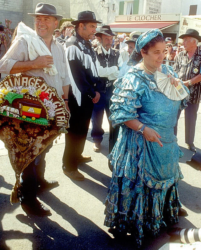 Pèlerinage gitan en l'honneur de leur patronne Sarah la Noire